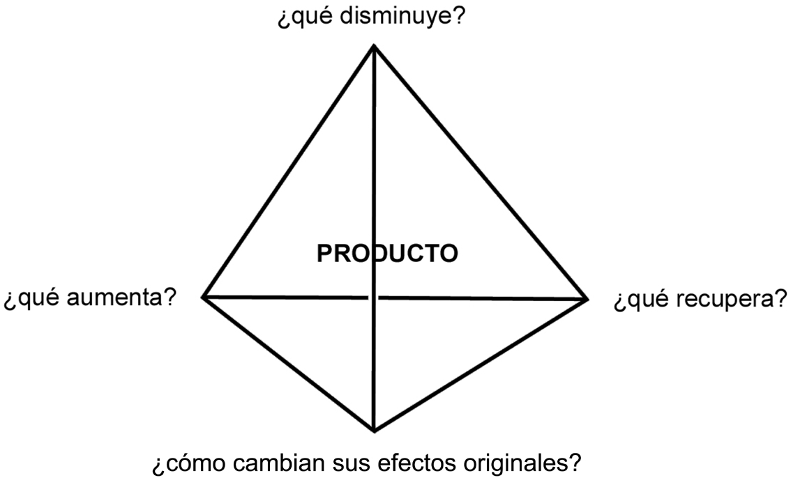 Las cuatro preguntas de Marshall McLuhan sobre las tecnologías